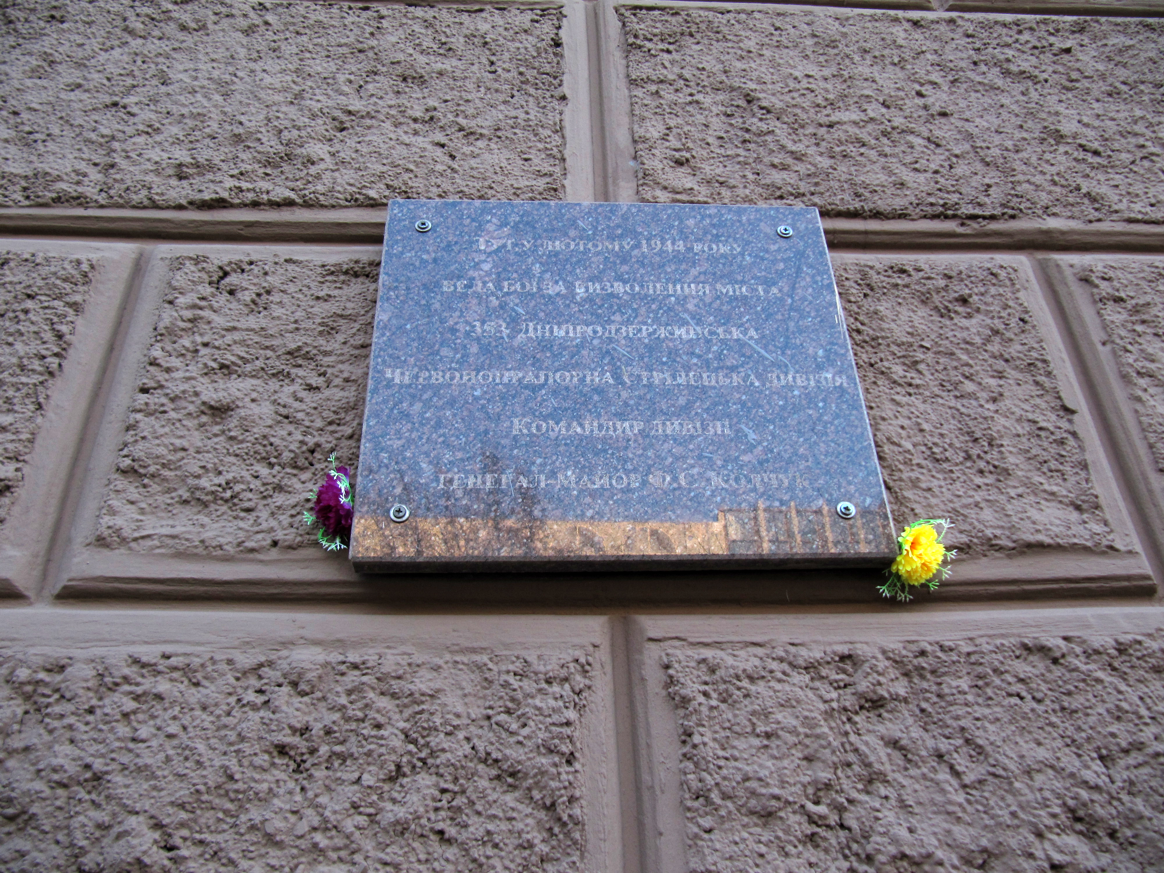 Житловий будинок (1952р.), проспект Карла Маркса, 19. Меморіальна дошка 353-тій стрілецькій дивізії